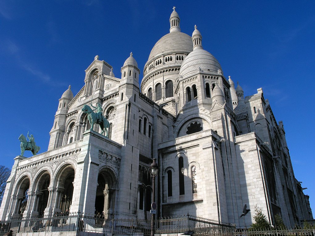 Le Sacré Coeur, Paris, France